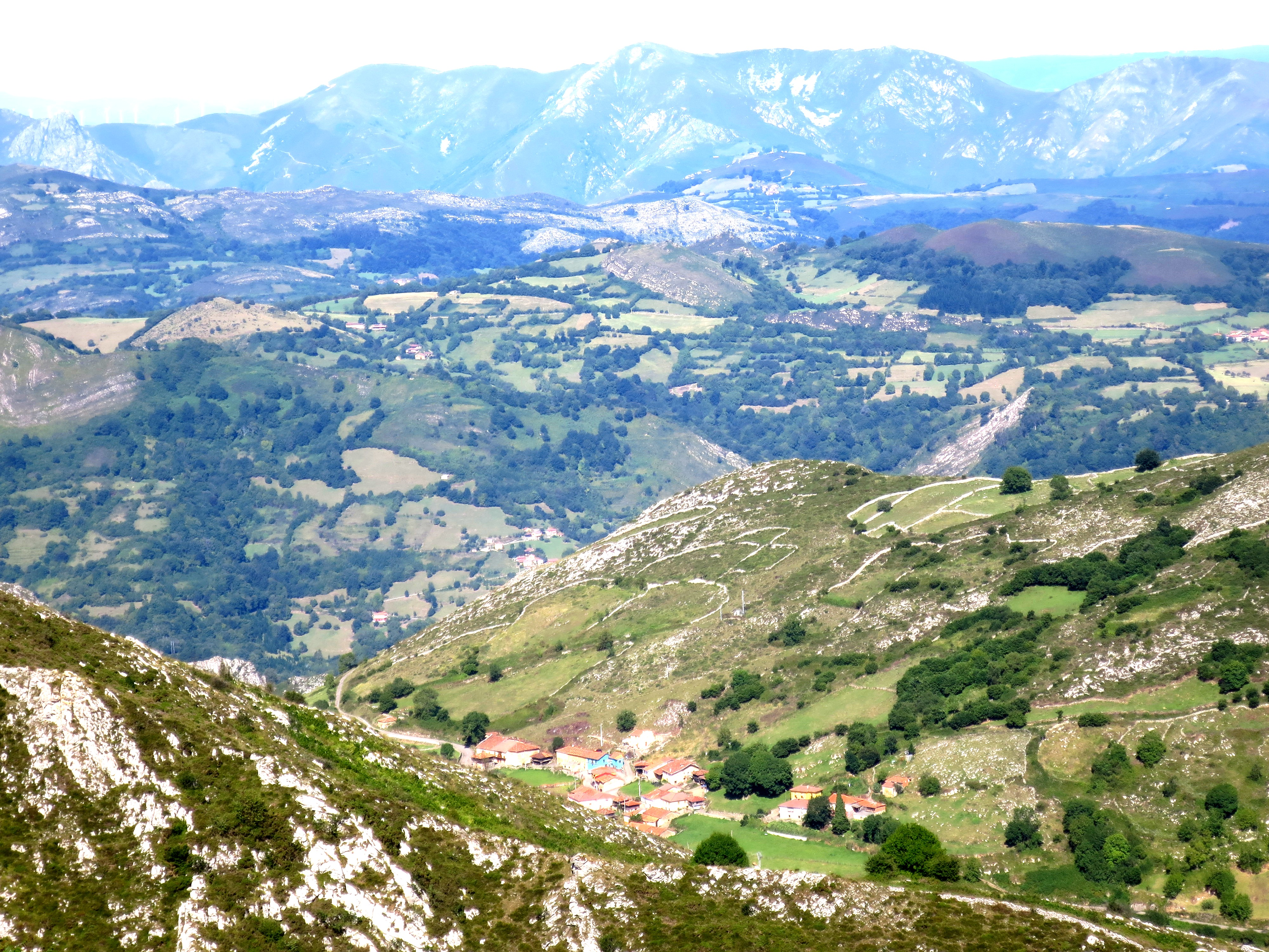 Vista desde el Aula de la Naturaleza del pueblo de Yernes